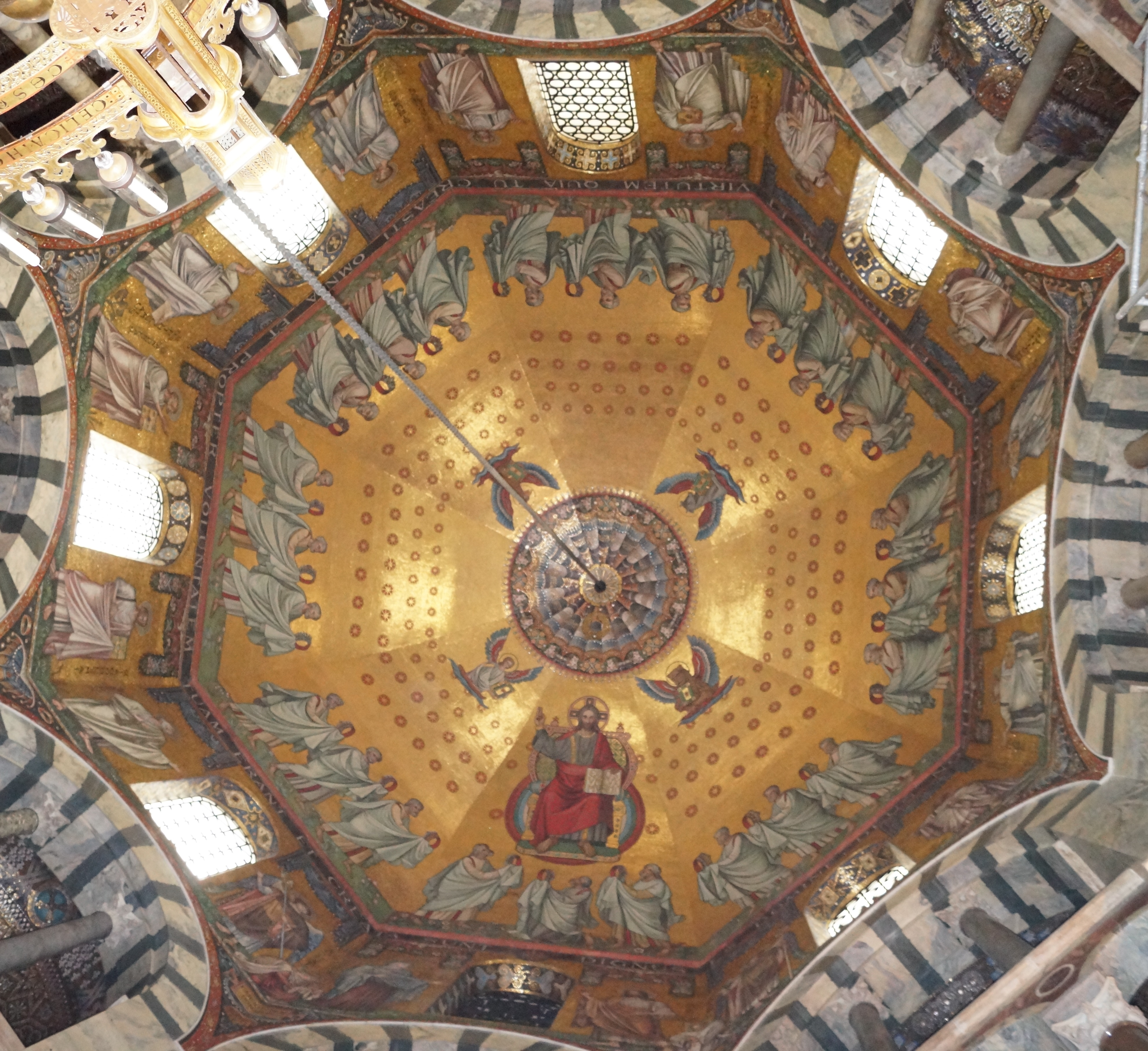 Aachener Dom: Kuppelmosaik Oktogon